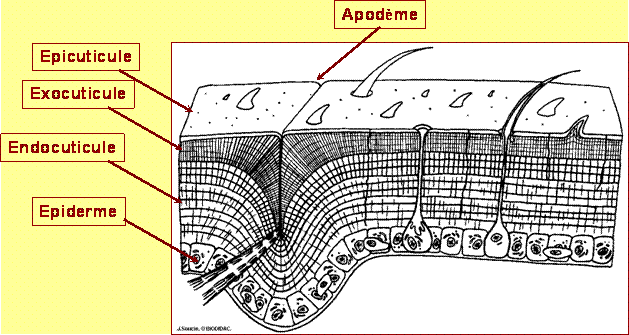 schema montrant les differentes parties de la cuticule